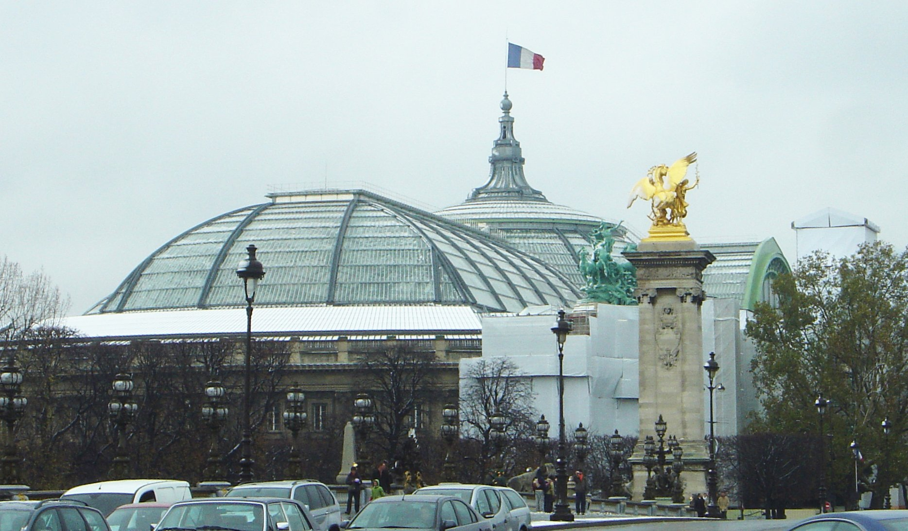 Grand Palais, Paris, France